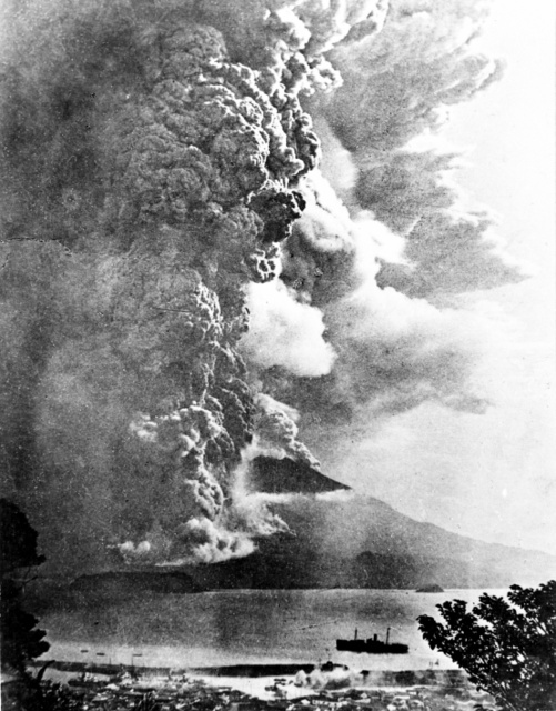 Sakurajima eruption (桜島の噴火)